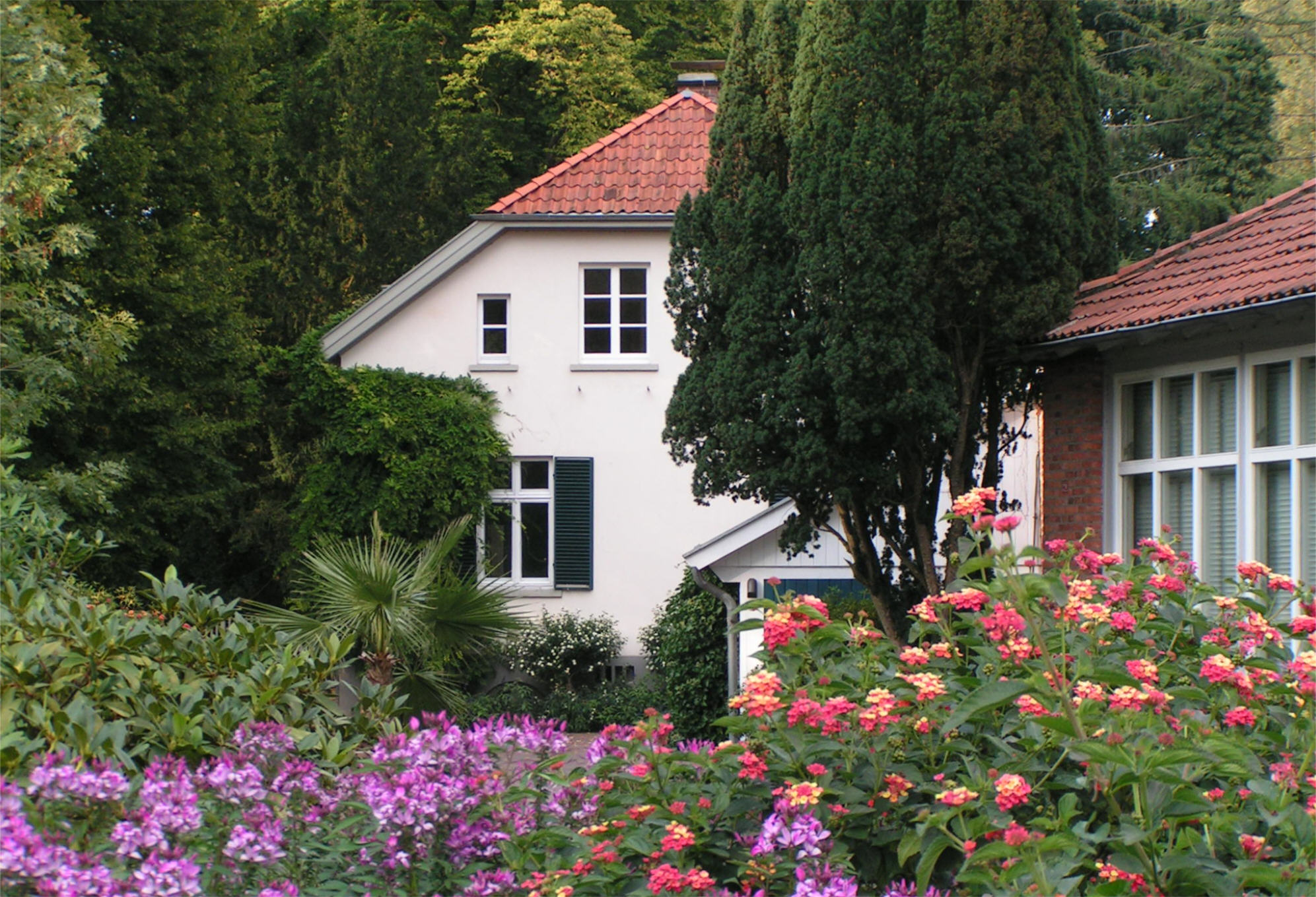 Haus der Parkverwaltung im Schlossgarten Oldenburg